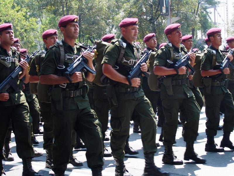 Brigada de Fusileros Paracaidistas durante desfile en la Ciudad de México en conmemoración del inicio de Guerra por la Independencia.